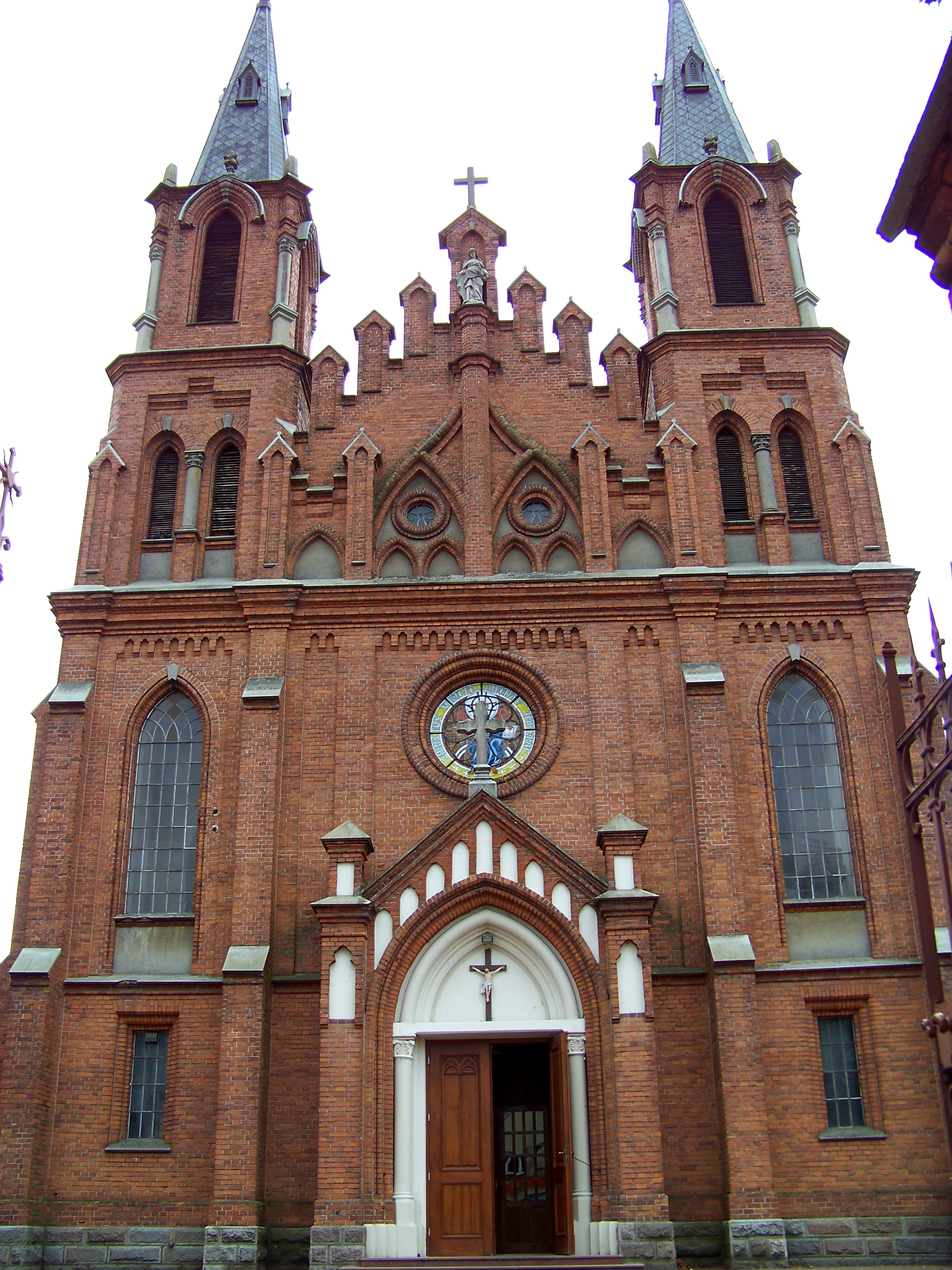 Łosice - zespół kościoła parafialnego p.w. św. Zygmunta Króla i Męczennika (1905-1910): kościół, widok od ul. Marszałka Piłsudskiego (zabytek nr A-188)